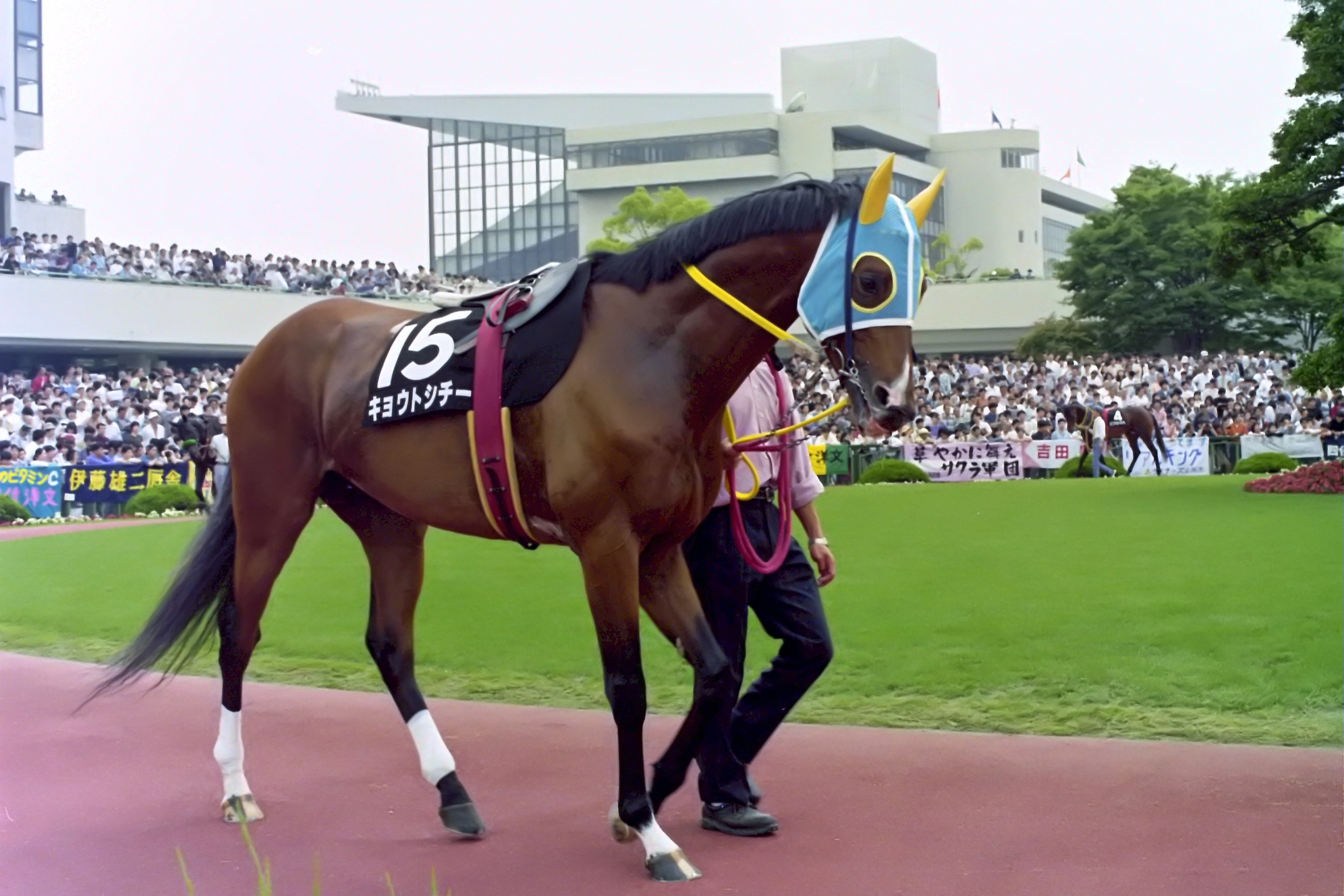 キョウトシチー 1995年6月4日 京都競馬場